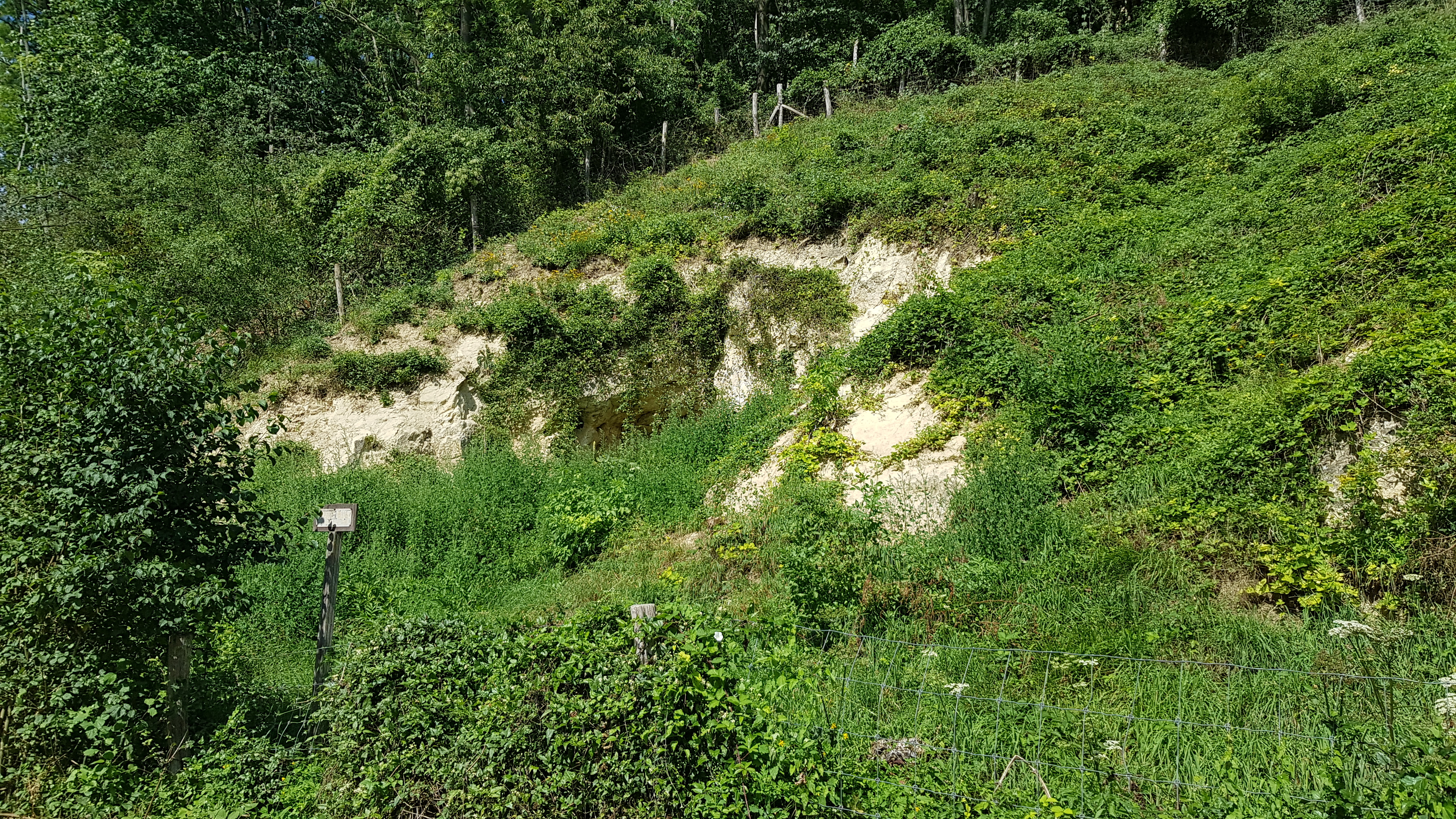 Mettenberggroeve IV, Bemelen, Nederland